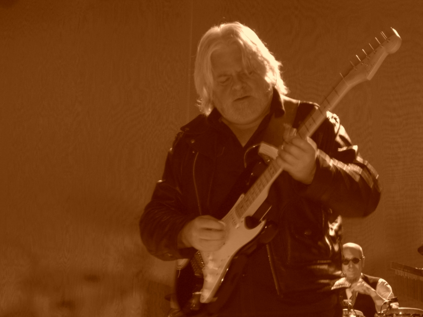 Frank Diez zusammen mit Ray Cooper während eines Peter Maffay Konzerts in Koblenz 2009